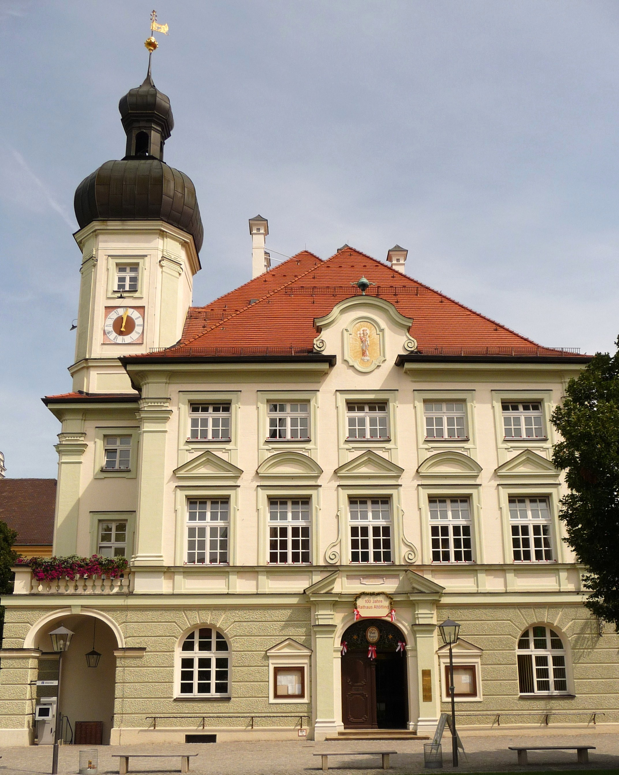 Das Rathaus von Altötting